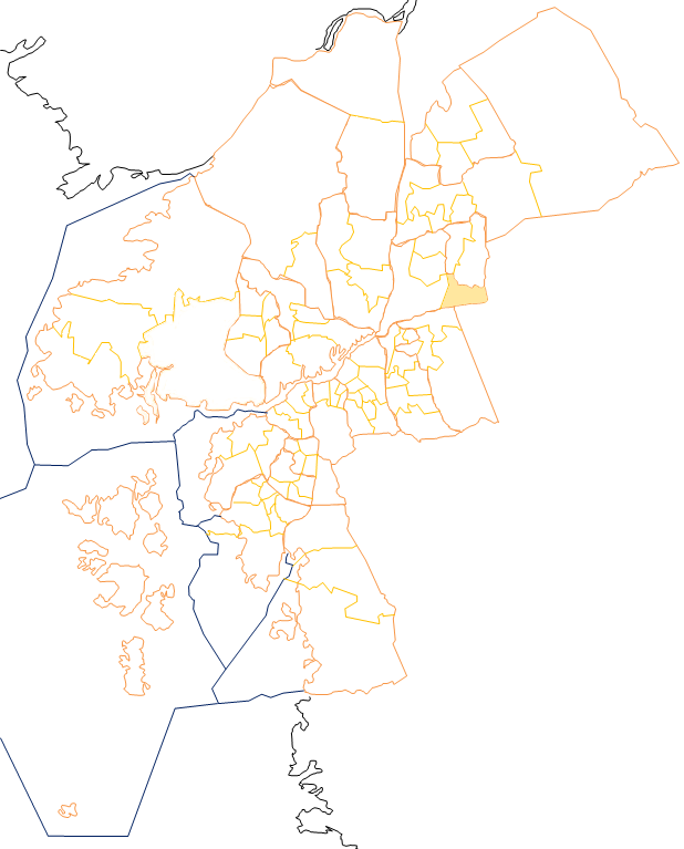 Karta som visar primärområdes belägenhet i Göteborg